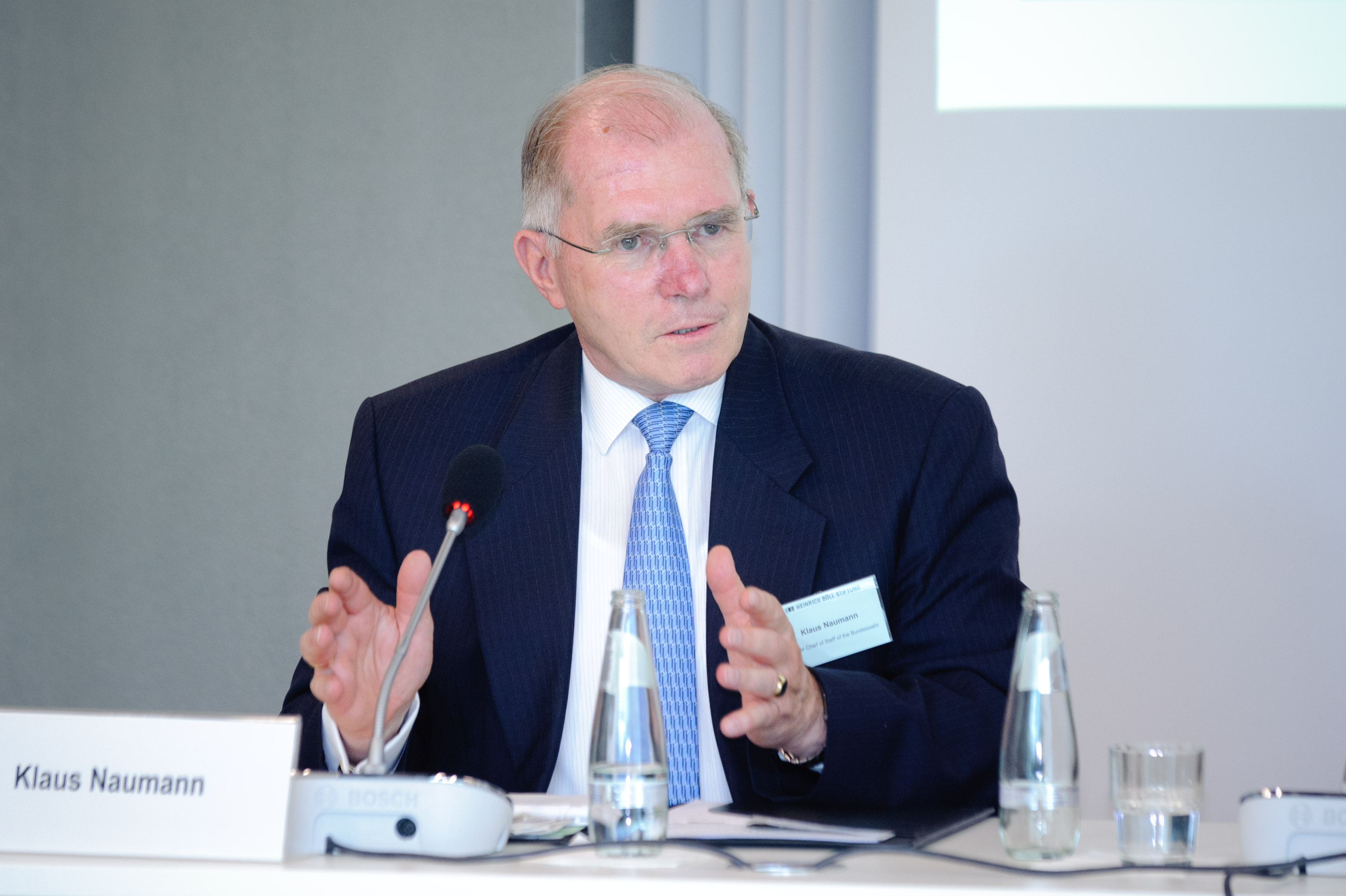 Klaus Naumann (ehem. Generalinspekteur der Bundeswehr)